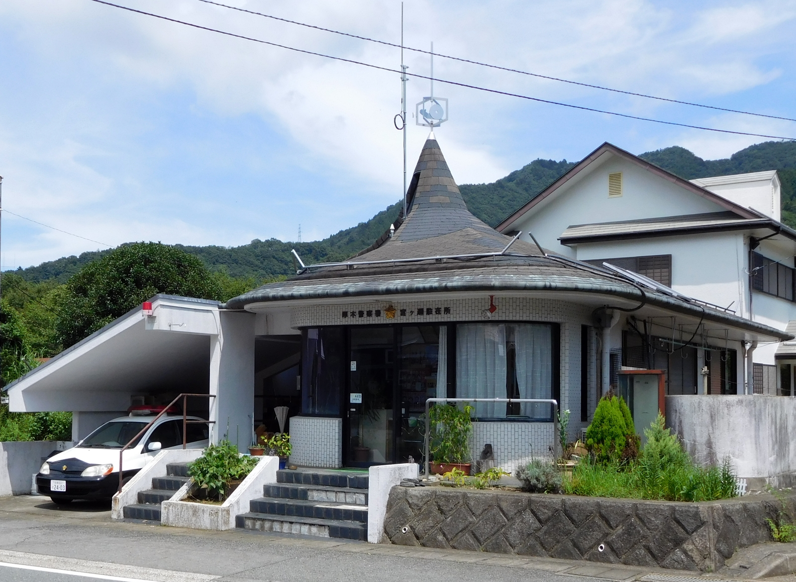 神奈川県警察厚木警察署宮ヶ瀬駐在所